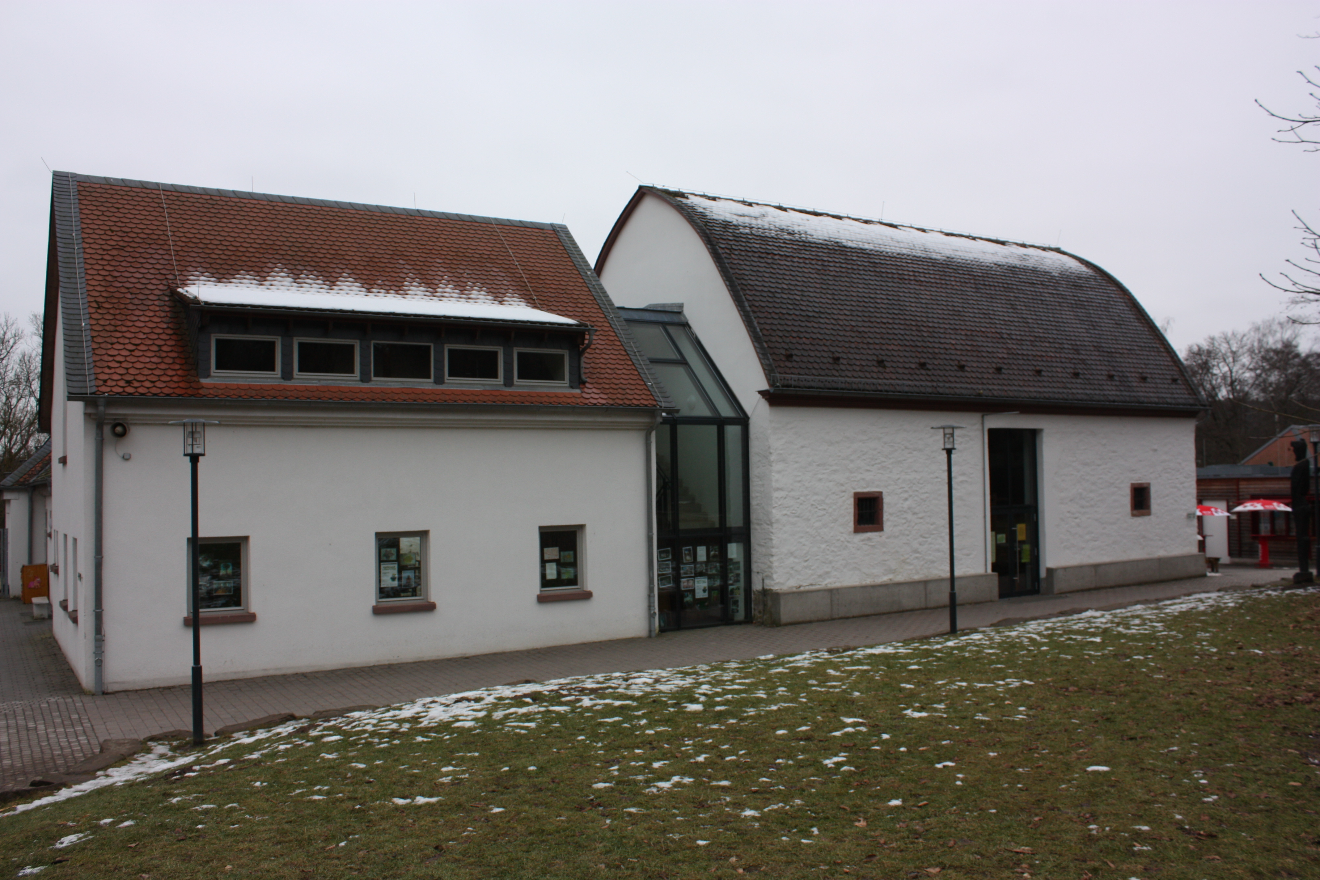 Informationszentrum im Tier- und Pflanzenpark Fasanerie Wiesbaden